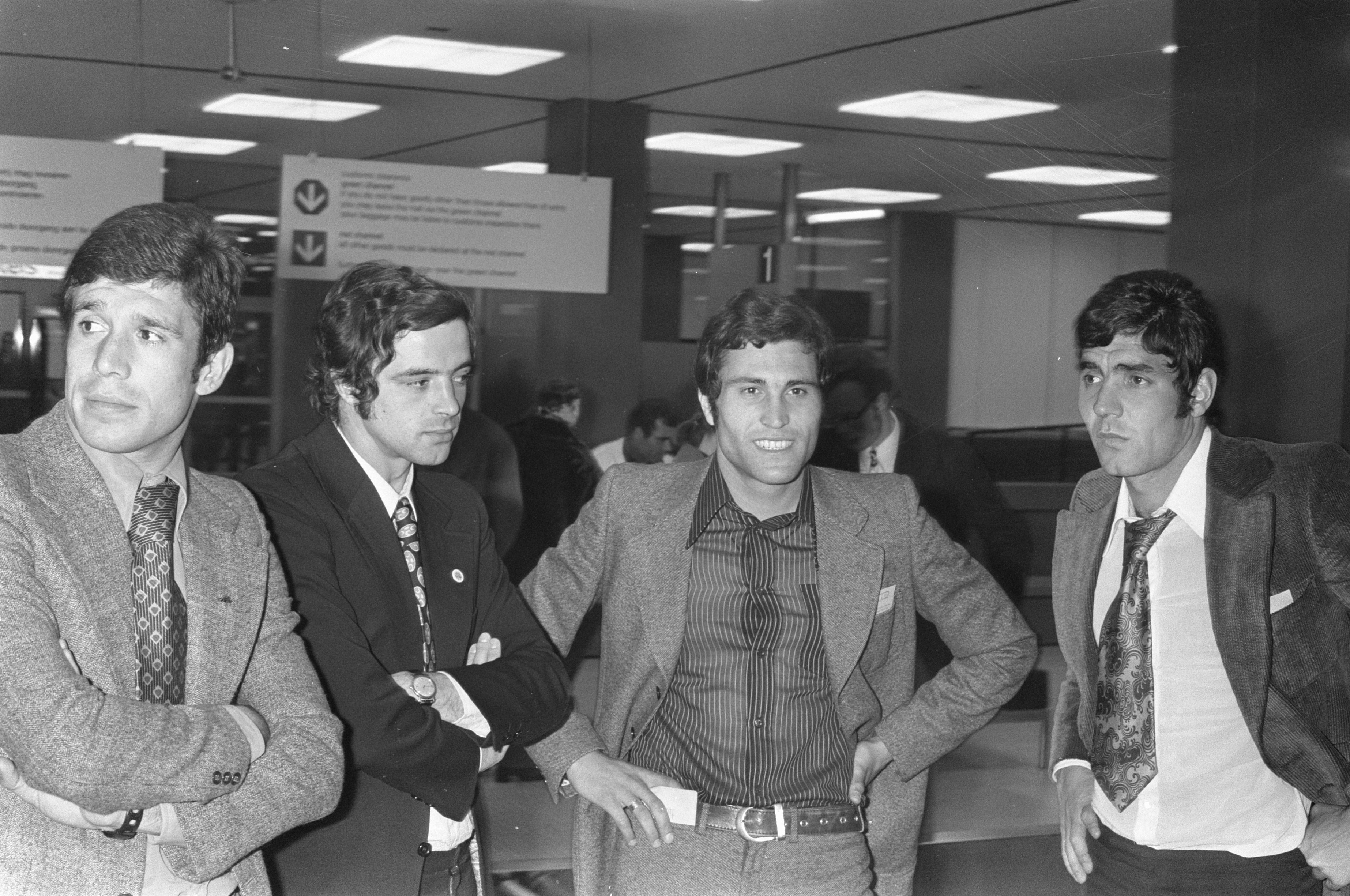 Collectie / Archief : Fotocollectie Anefo Reportage / Serie : [ onbekend ] Beschrijving : Aankomst Benfica op Schiphol, v.l.n.r. Coelho, Jorge, Baptista, Toni Datum : 3 april 1972 Locatie : Noord-Holland, Schiphol Trefwoorden : sport, voetballers Instellingsnaam : Benfica Fotograaf : Punt, […] / Anefo Auteursrechthebbende : Nationaal Archief Materiaalsoort : Negatief (zwart/wit) Nummer archiefinventaris : bekijk toegang 2.24.01.05 Bestanddeelnummer : 925-5027